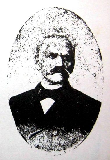 Retrato del litógrafo venezolano Gerónimo Martínez (conocido también como Jerónimo Martínez)